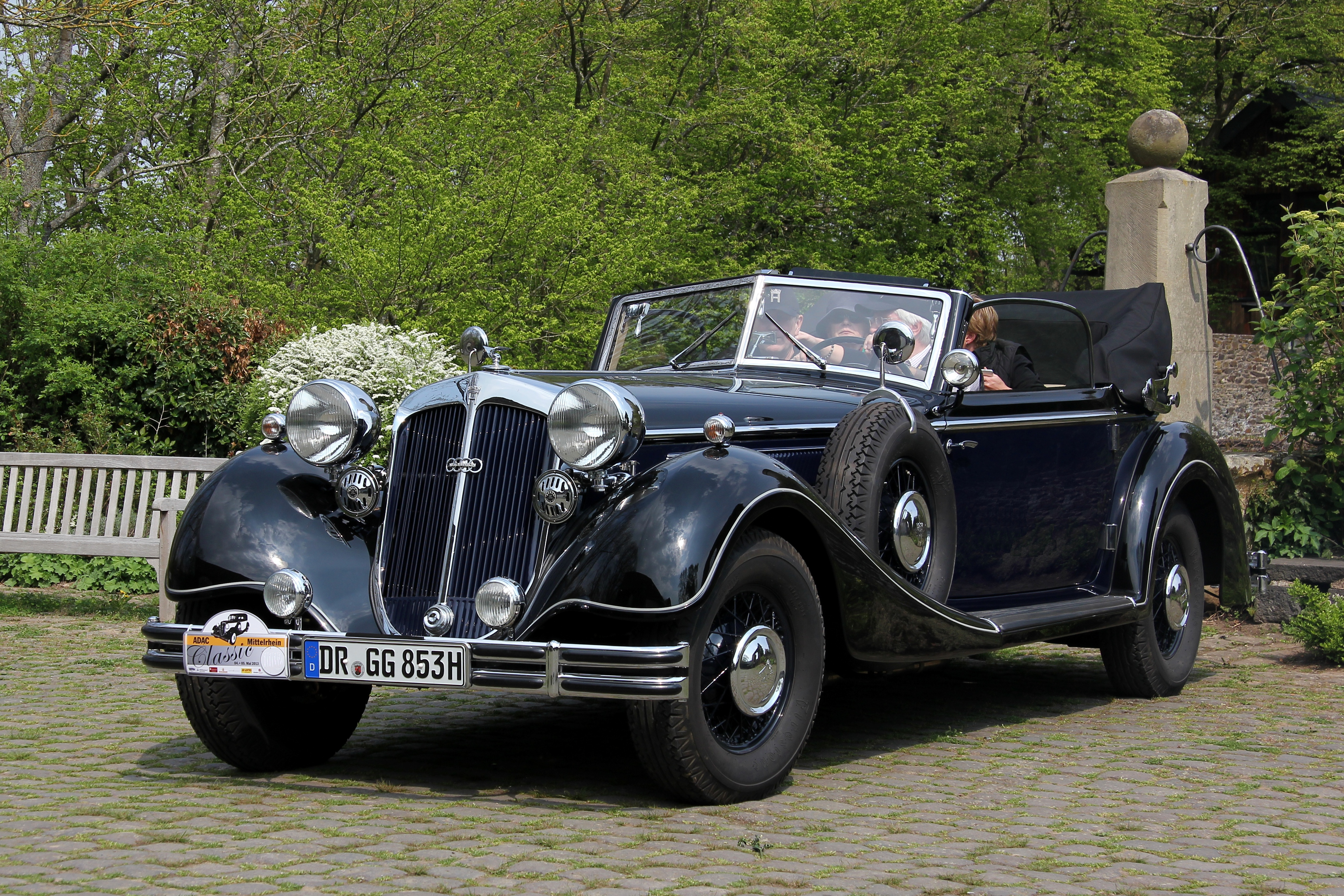 Horch 853, Baujahr 1936; 8-Zylinder-Reihenmotor, 4944 cm³, 100 PS